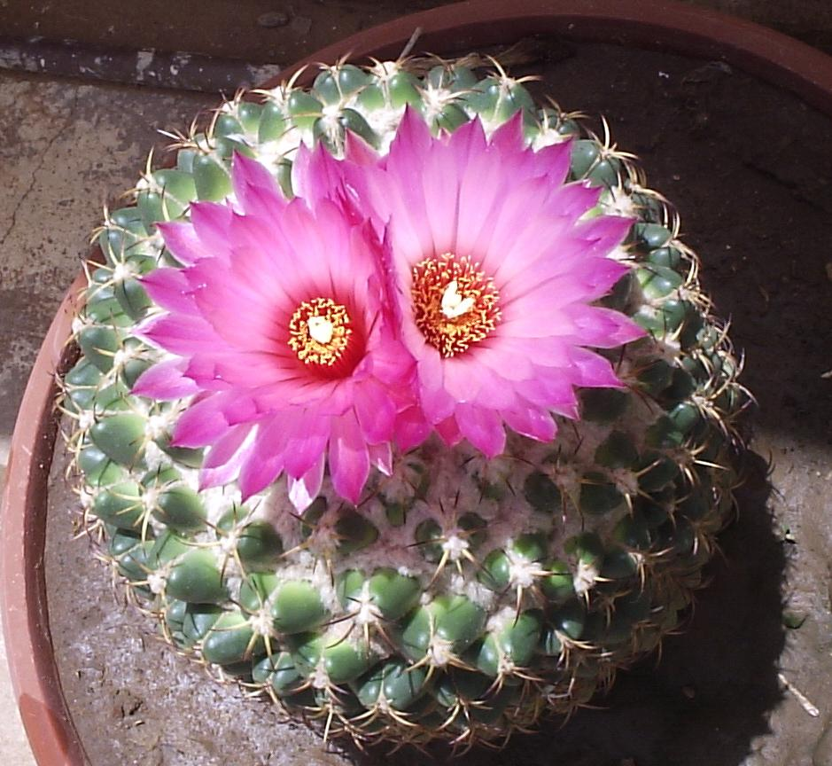 صورة للتين الشوكي، نوع من الصبار Cacti